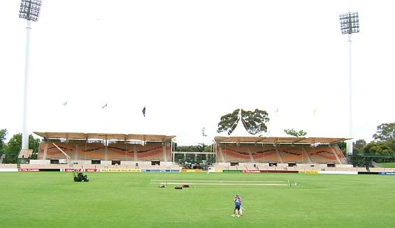 Chappell stand at Adelaide Oval